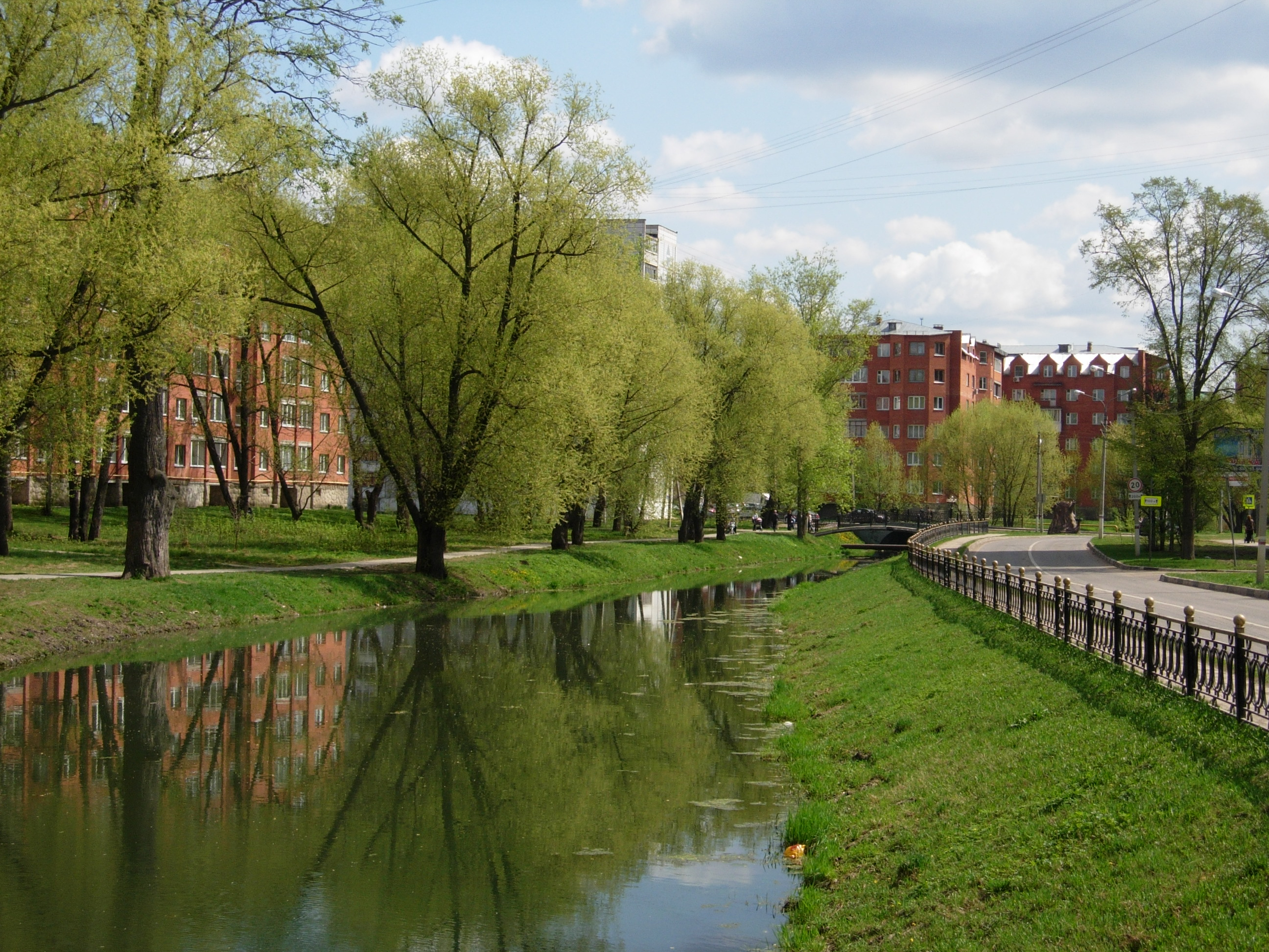 Dmitrov